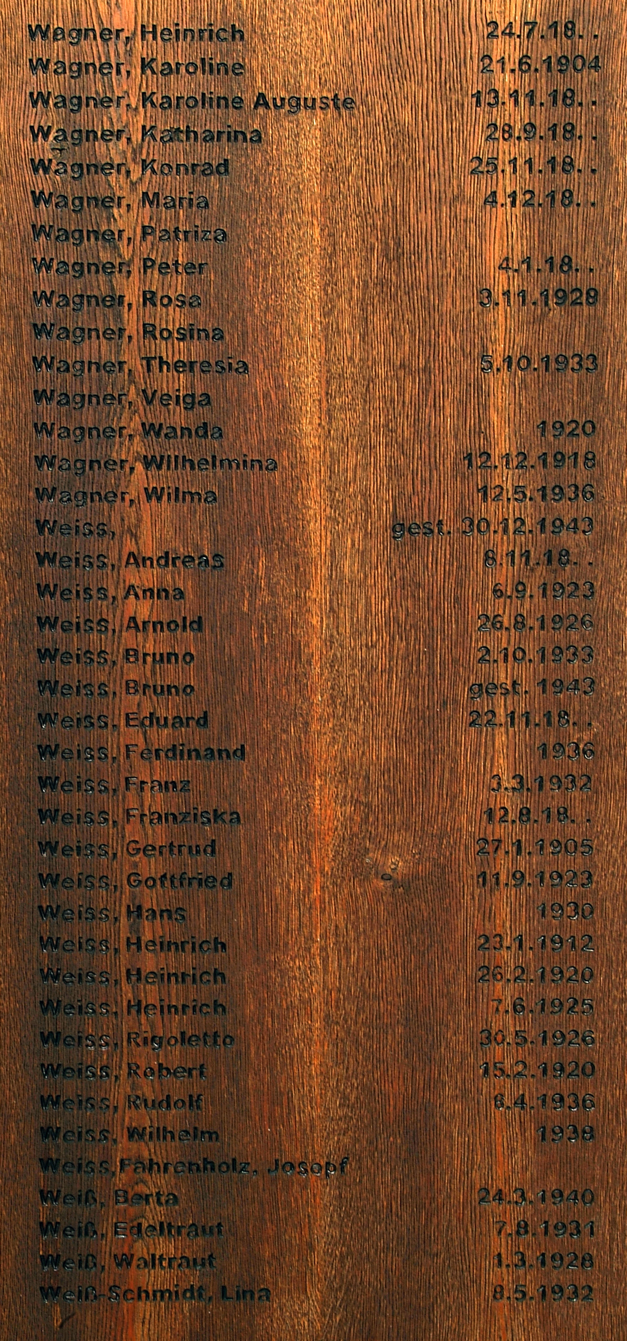 Die rechte Tafel am Mahnmal für die Sinti im Altwarmbüchener Moor mit den Namen und - sofern bekannt - Geburtsdaten der von Hannover aus deportierten Sinti